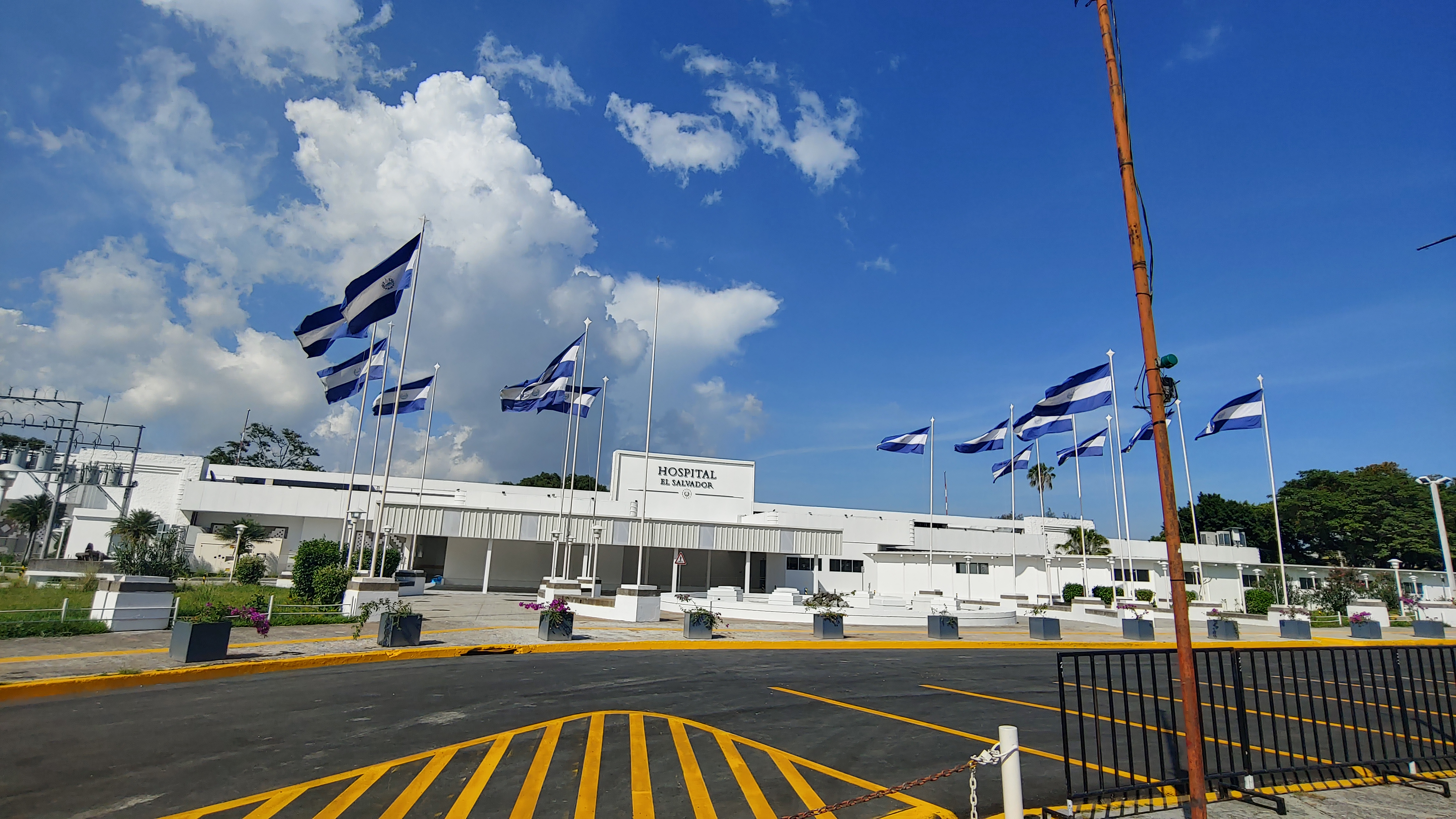 National Hospital El Salvador